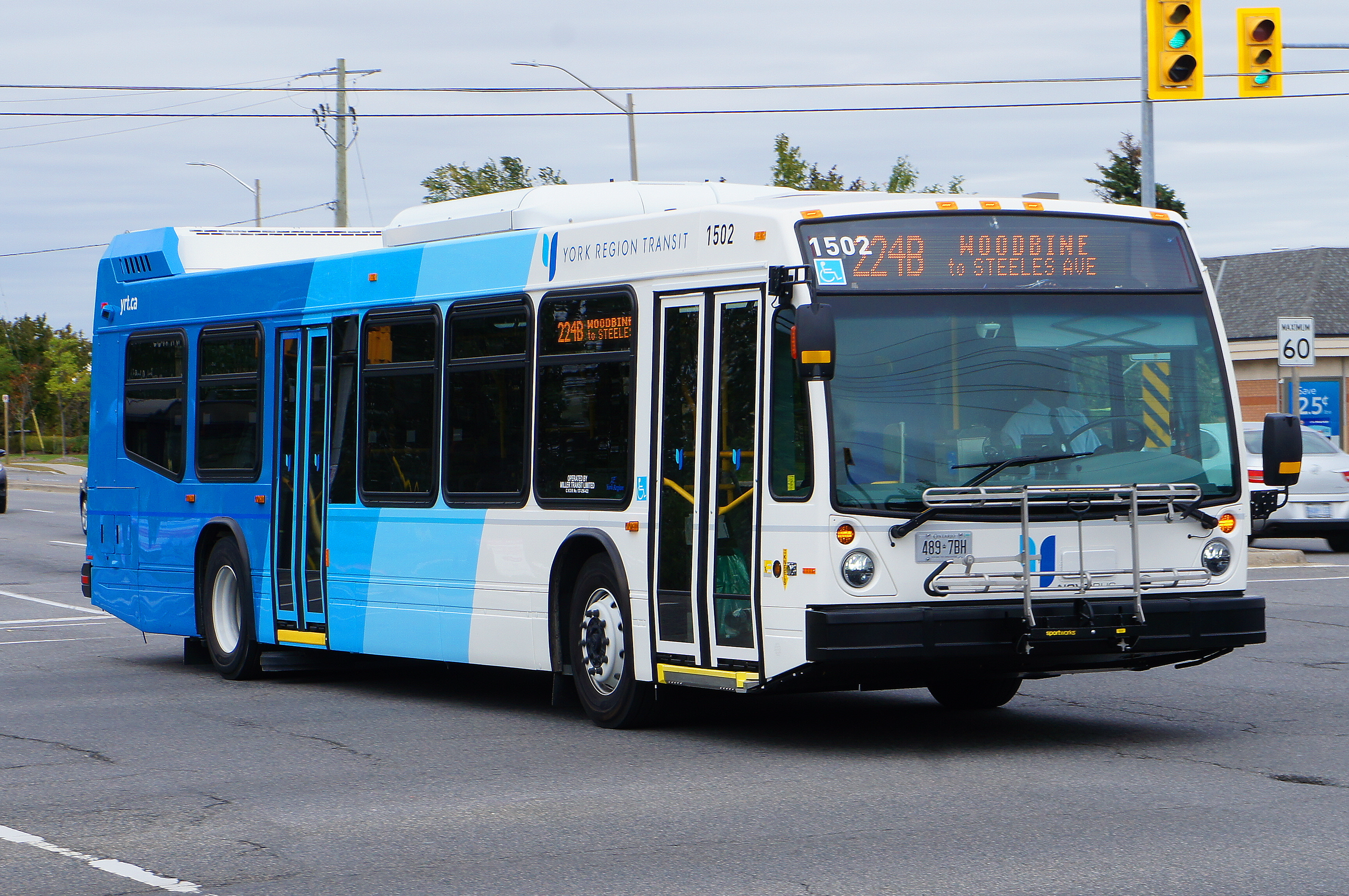 York Region Transit 2015 Nova Bus LFS #1502 is on Route 224 on Oct 4th, 2015